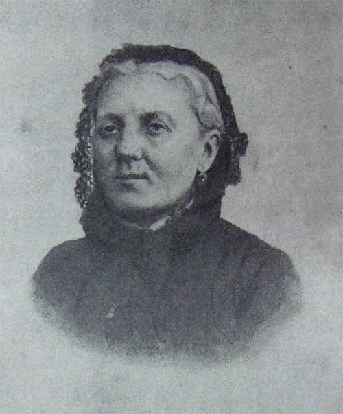 Portrait d'Isabelle Bogelot, paru dans l'Almanach féministe, 1898